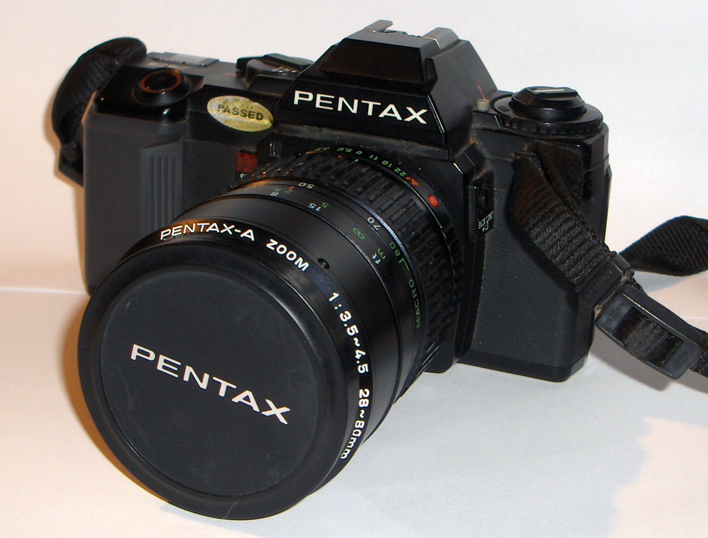 Appareil Réflex argentique - Pentax A3